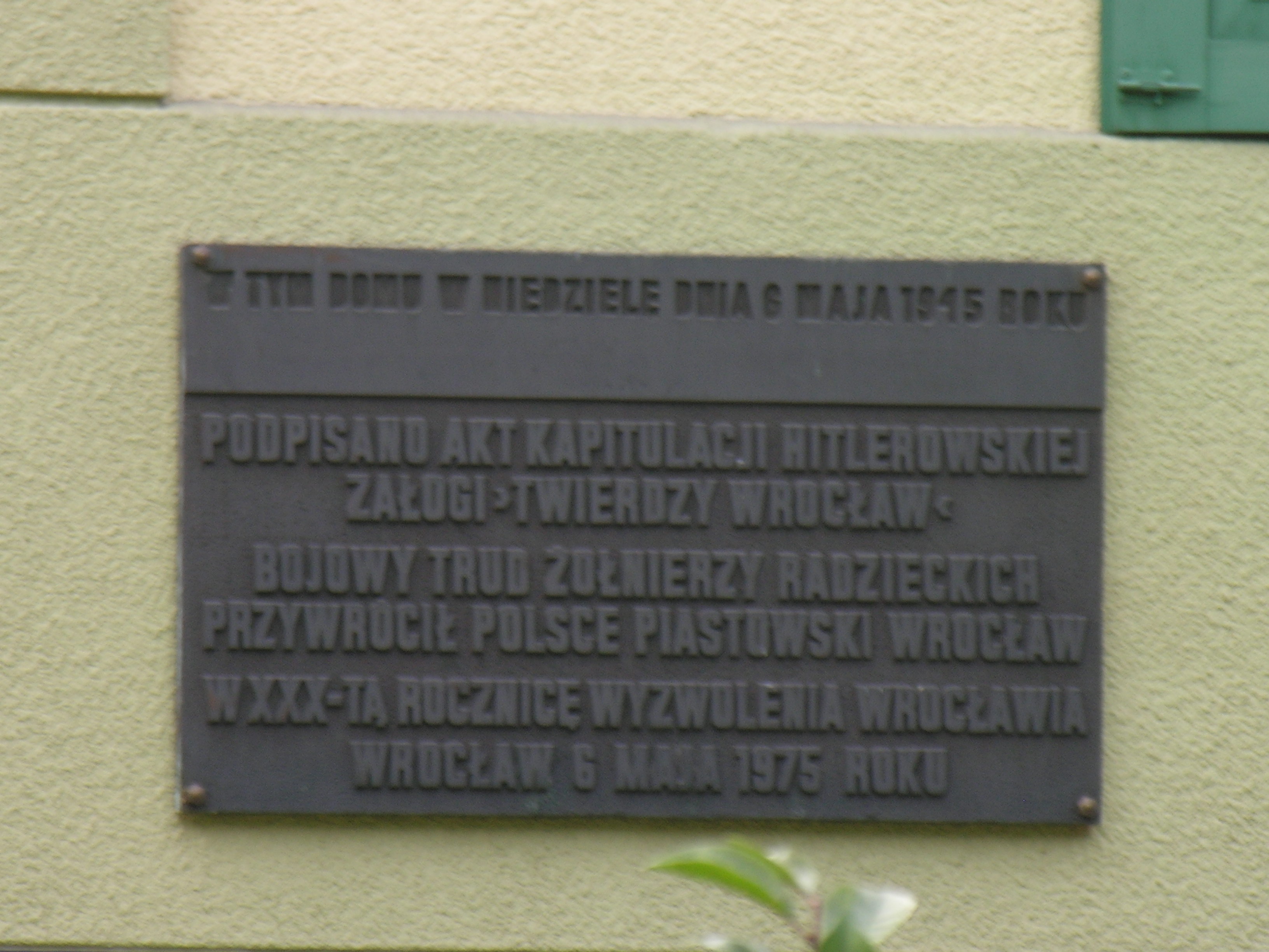 Tablica upamiętniająca podpisanie kapitulacji Wrocławia w Willi Colonia, ul. Rapackiego 14. Die Gedenkktafel an der Villa Colonia.